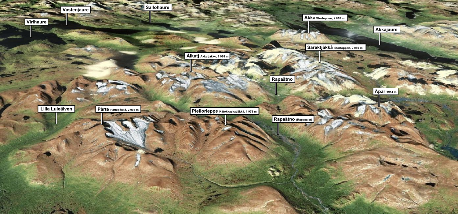 Massif de Sarek, en Suède, vu du sud-est, avec des repères sur les lieux notables (numéros pour les sommets, lettres pour les cours d'eau ou les lacs). Au premier plan, le Pårte (avec ses glaciers) et le Piellorieppe. À l'arrière-plan, le lac Akkajaure.